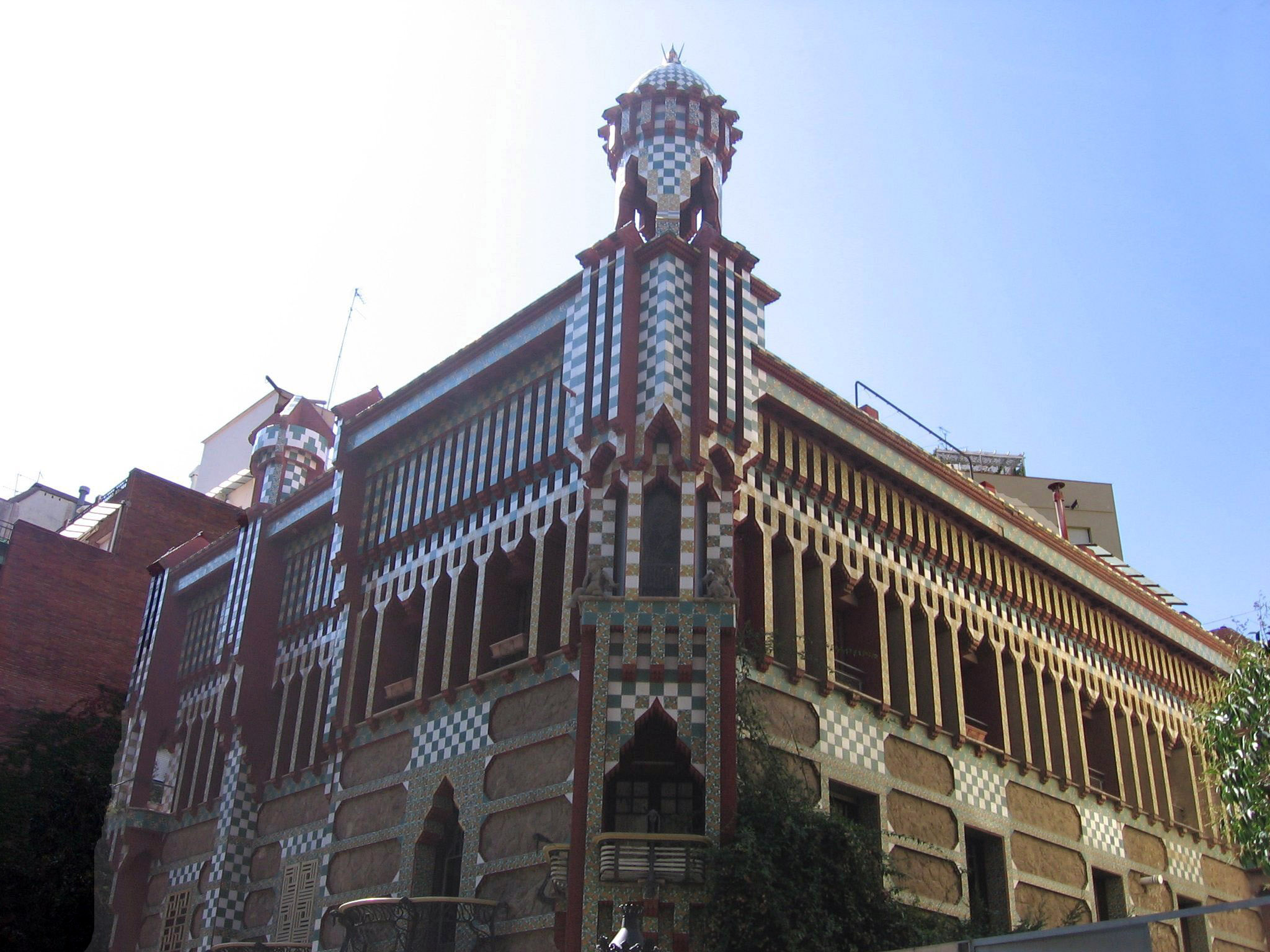 Casa Vicens, de Antoni Gaudí (Barcelona)